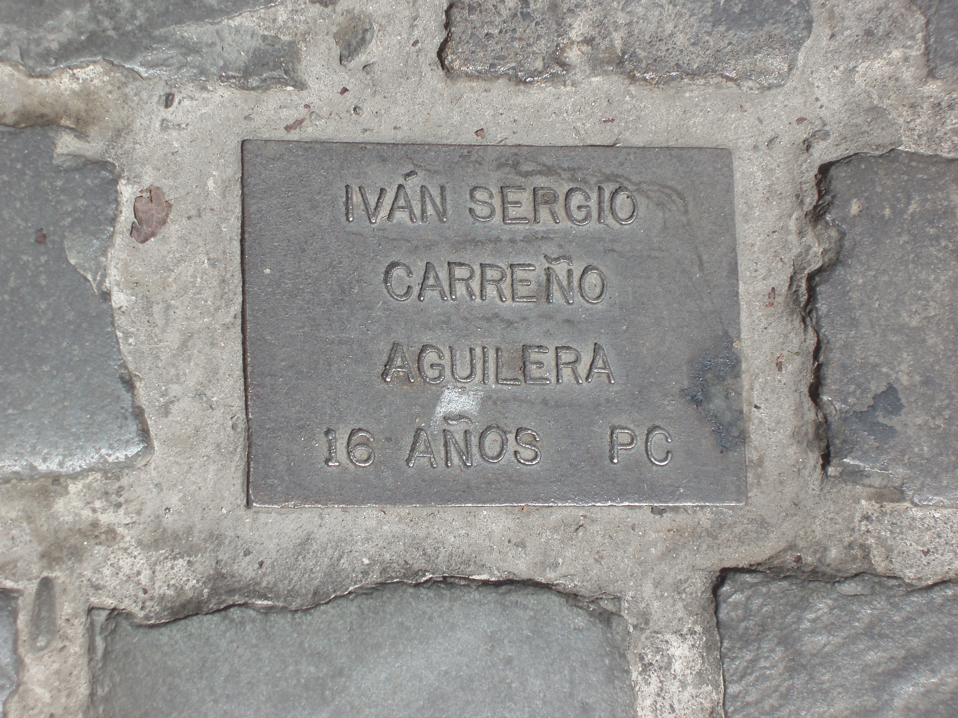 Gedenktäfelchen im Kopfsteinpflaster vor dem ehemaligen Geheimgefängnis in Londres 38, Santiago de Chile